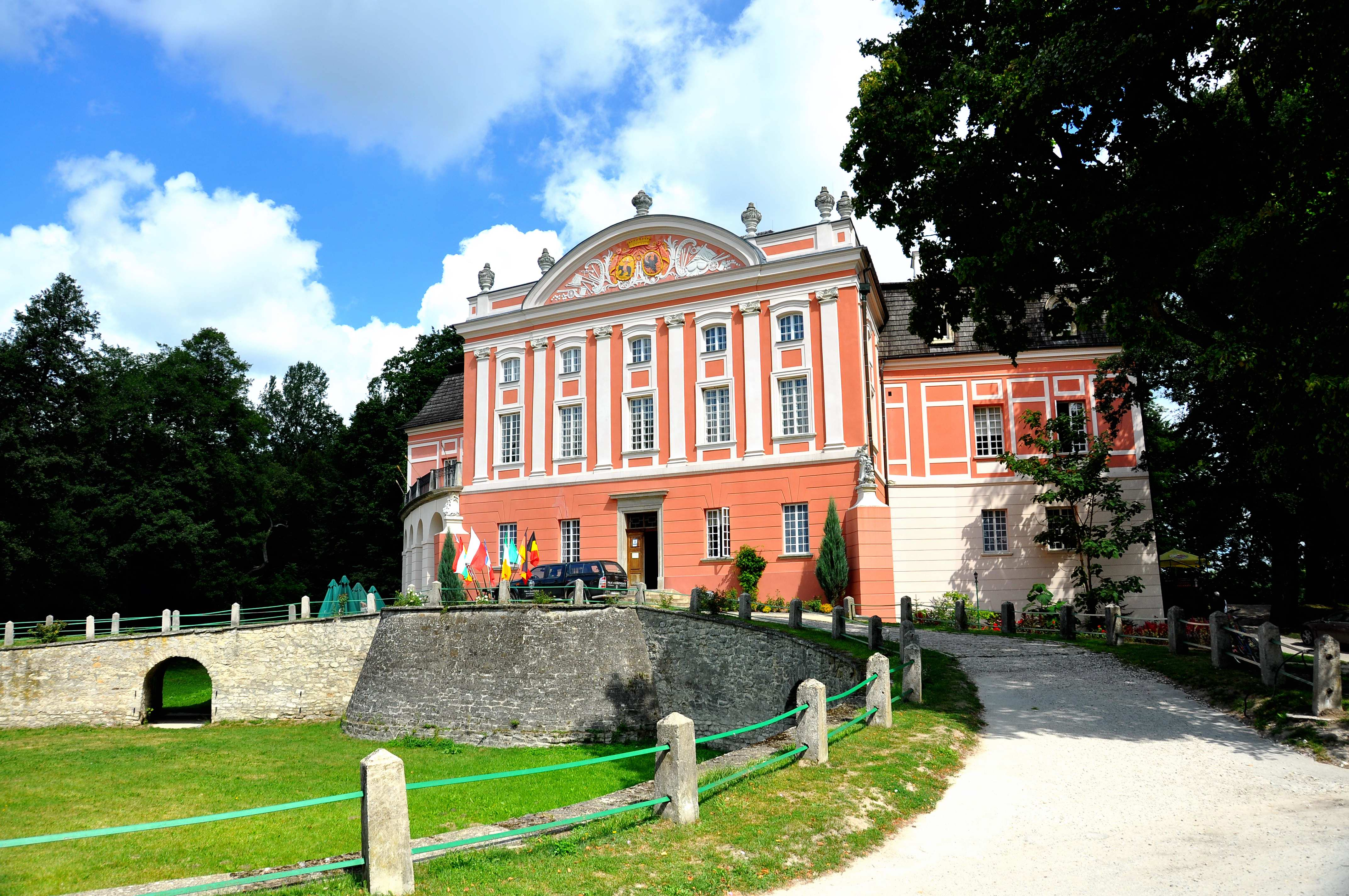 Kurozwęki - zamek, następnie pałac, 2 poł. XIV, XV, XVII, 2 poł. XVIII w.